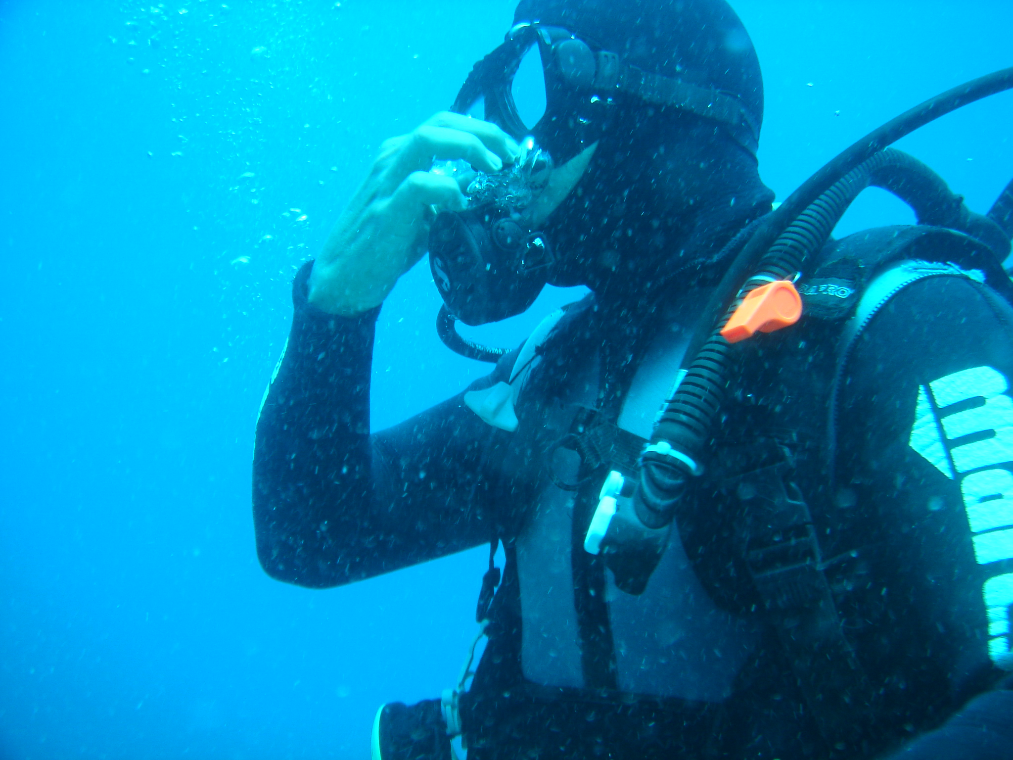 Decendiendo y realizando la compensacion - Galapagos DiveMaster